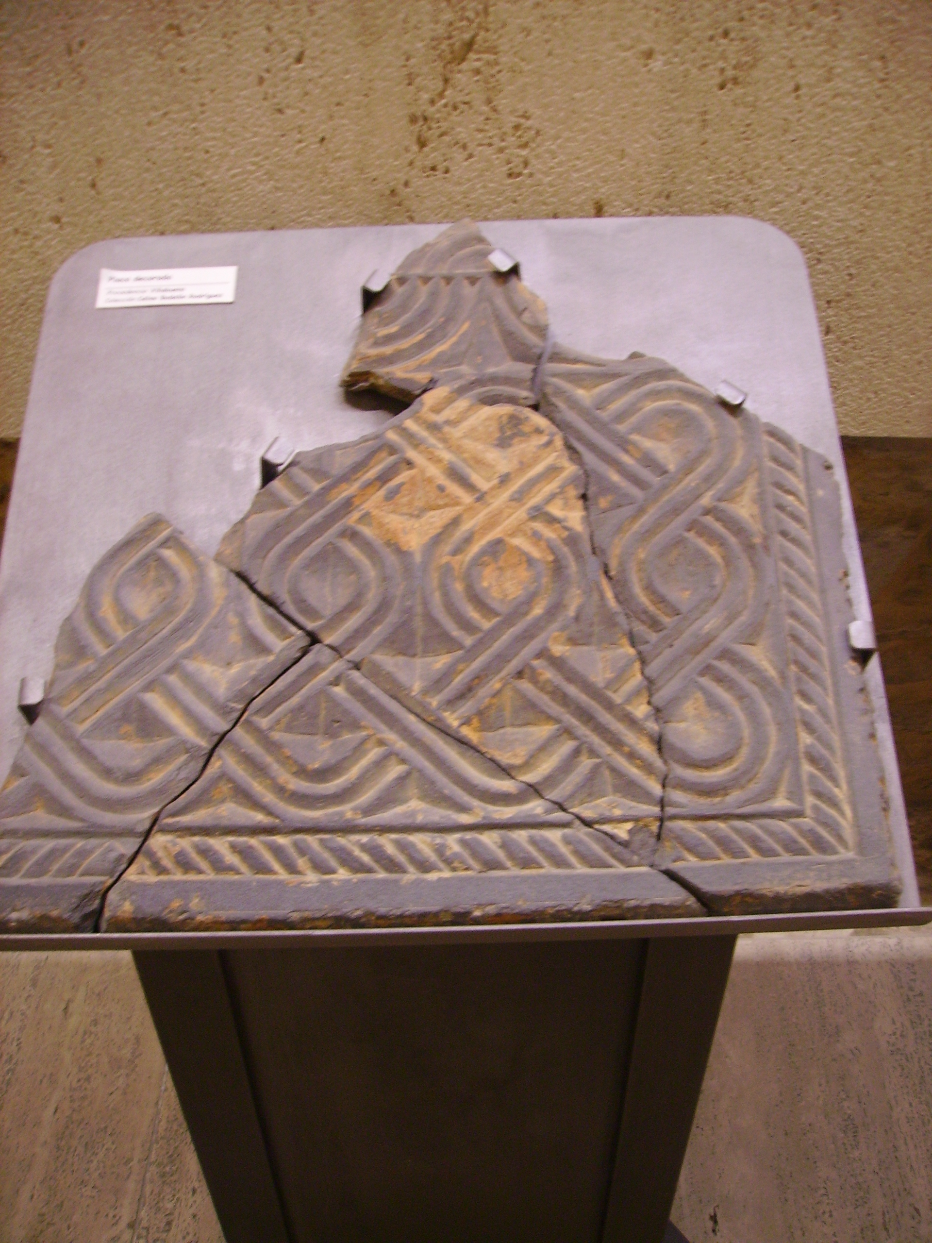 Lápida procedente de Castro Bergidum (Museo de El Bierzo, Ponferrada, León, España).